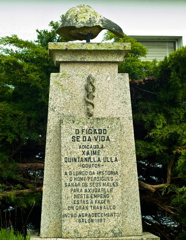 Monumento ao fígado. Valón, Doniños, Ferrol. Artigo en "La Voz de Galicia"